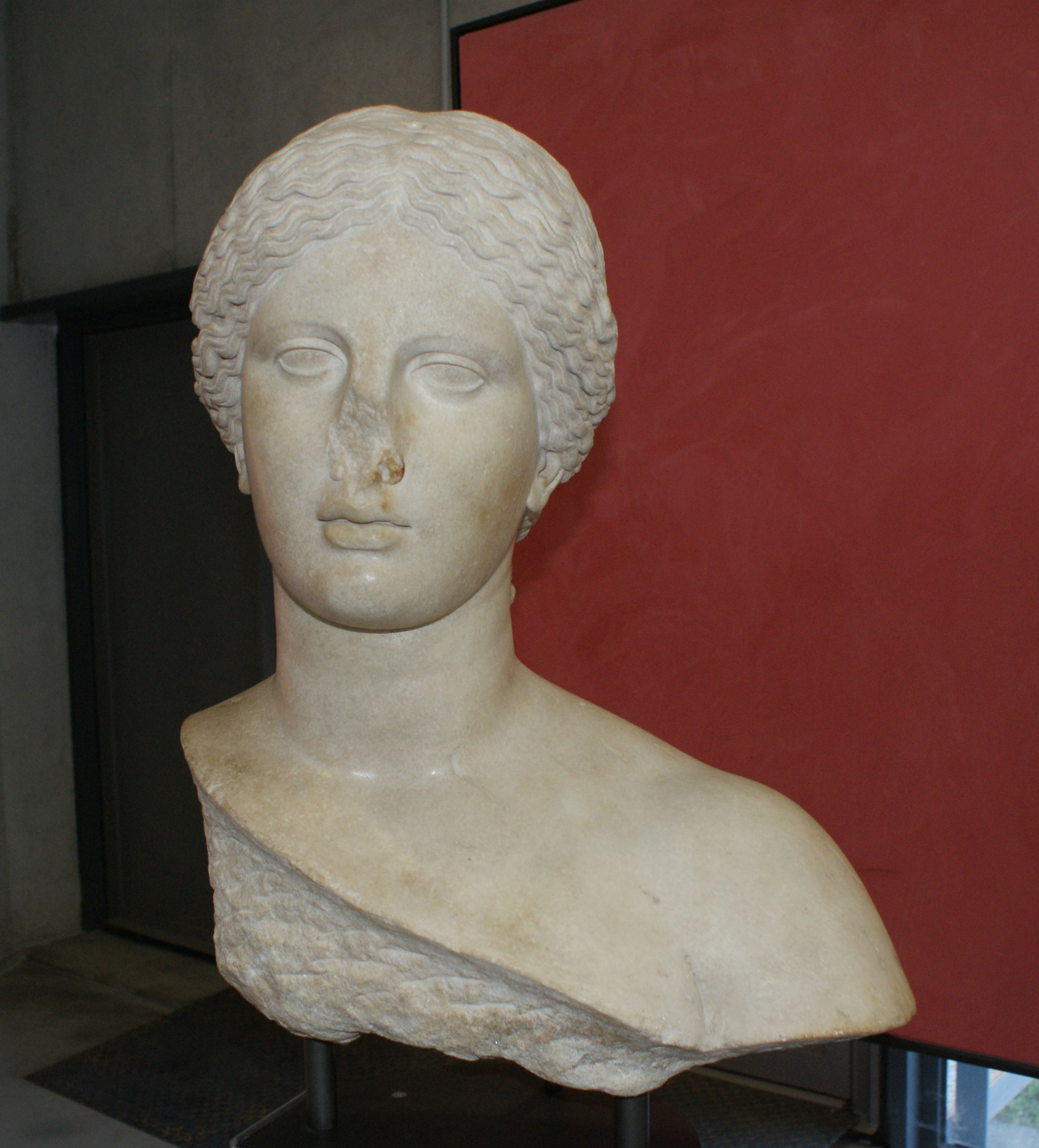 Buste d'Aphrodite, dite tête d'Arles (anciennement identifiée comme tête de Livie), découverte en 1823 dans les ruines du Théâtre Antique d'Arles, Musée de l'Arles antique (FAN.92,00,405)